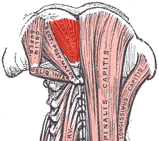 Rectus capitis posterior minor muscle